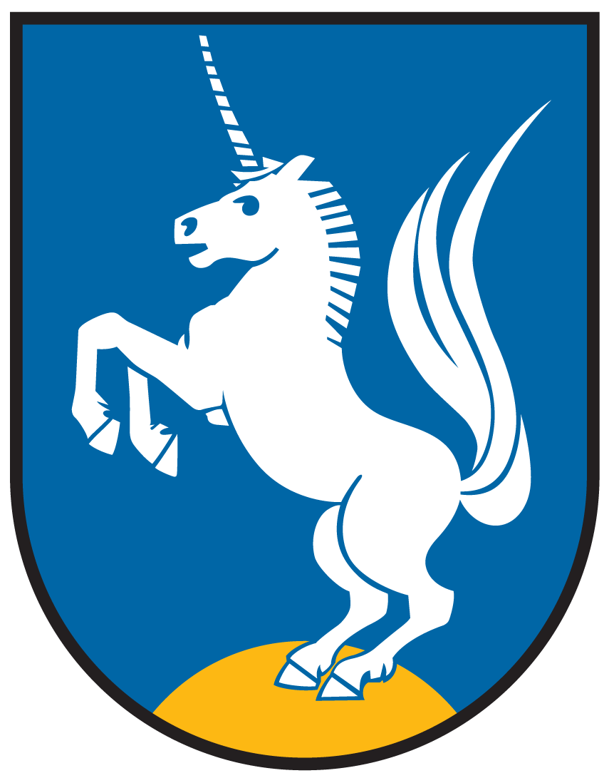 Wappen von Eberndorf.